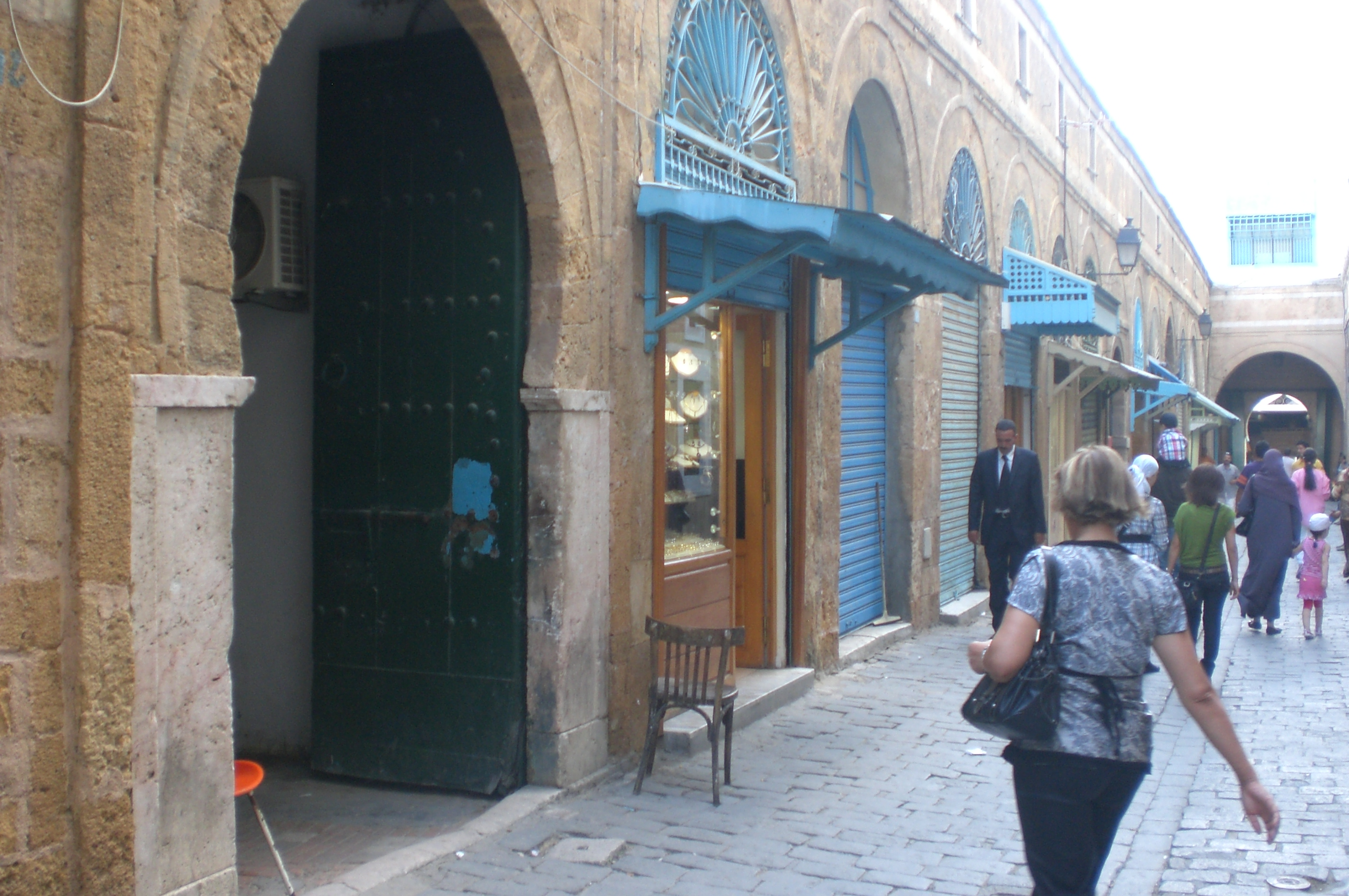 Suq in Tunis